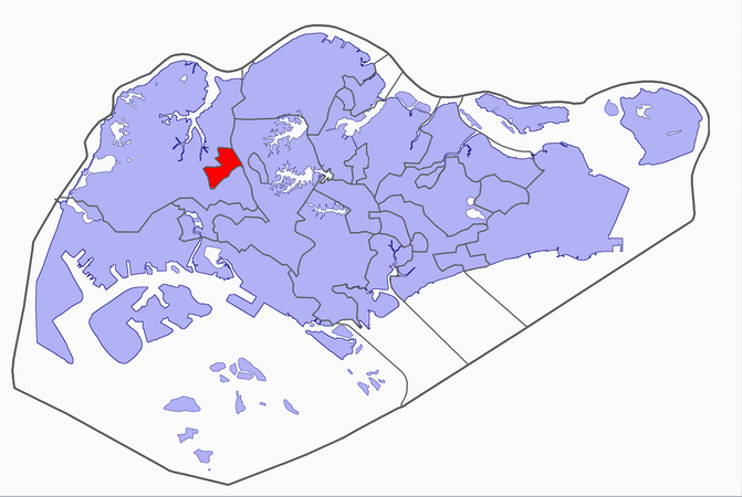 Singapore electoral map, 2006